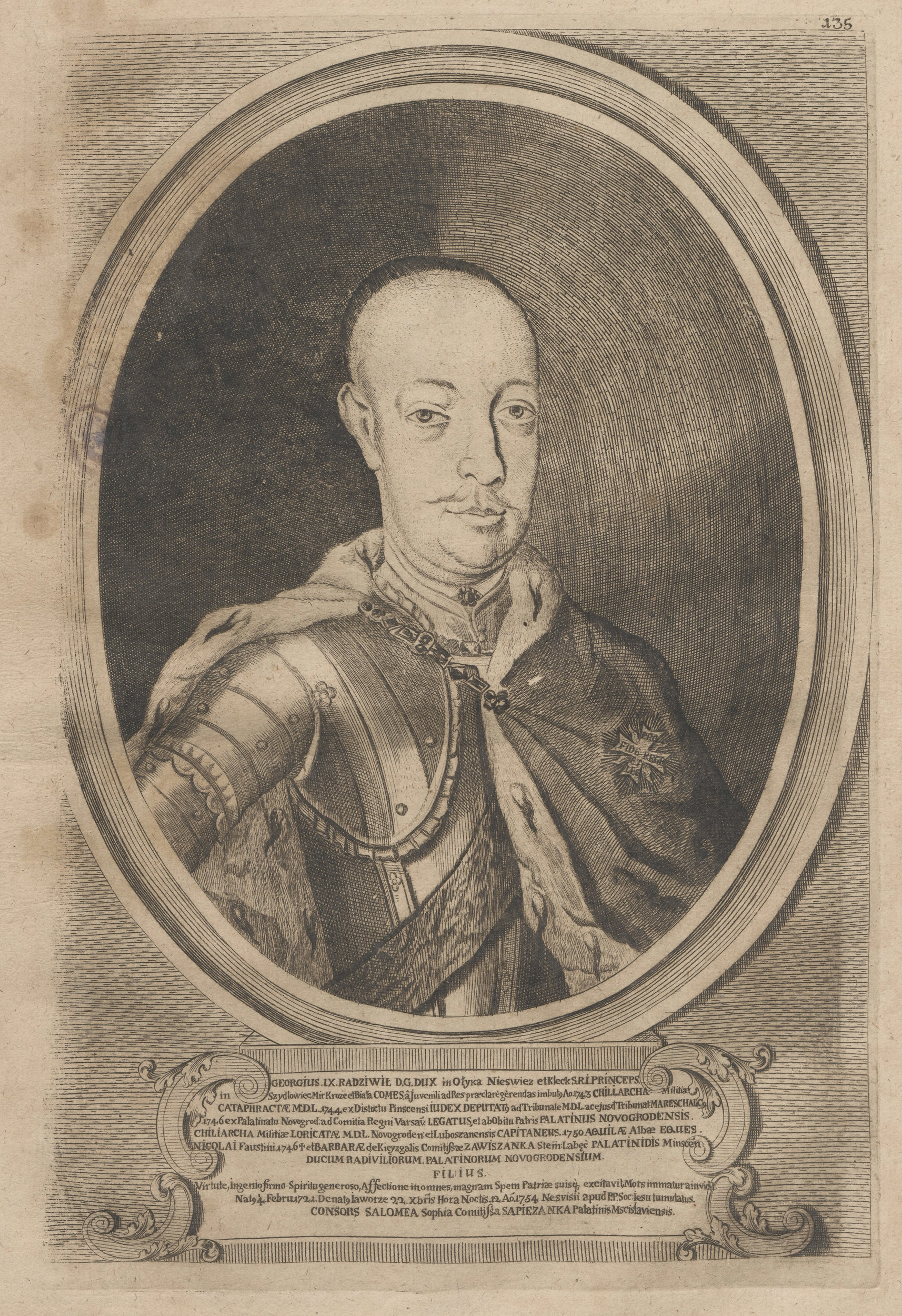 Беларуская (тарашкевіца): Партрэт Юрыя IX Радзівіла (Jury IX Radzivił)